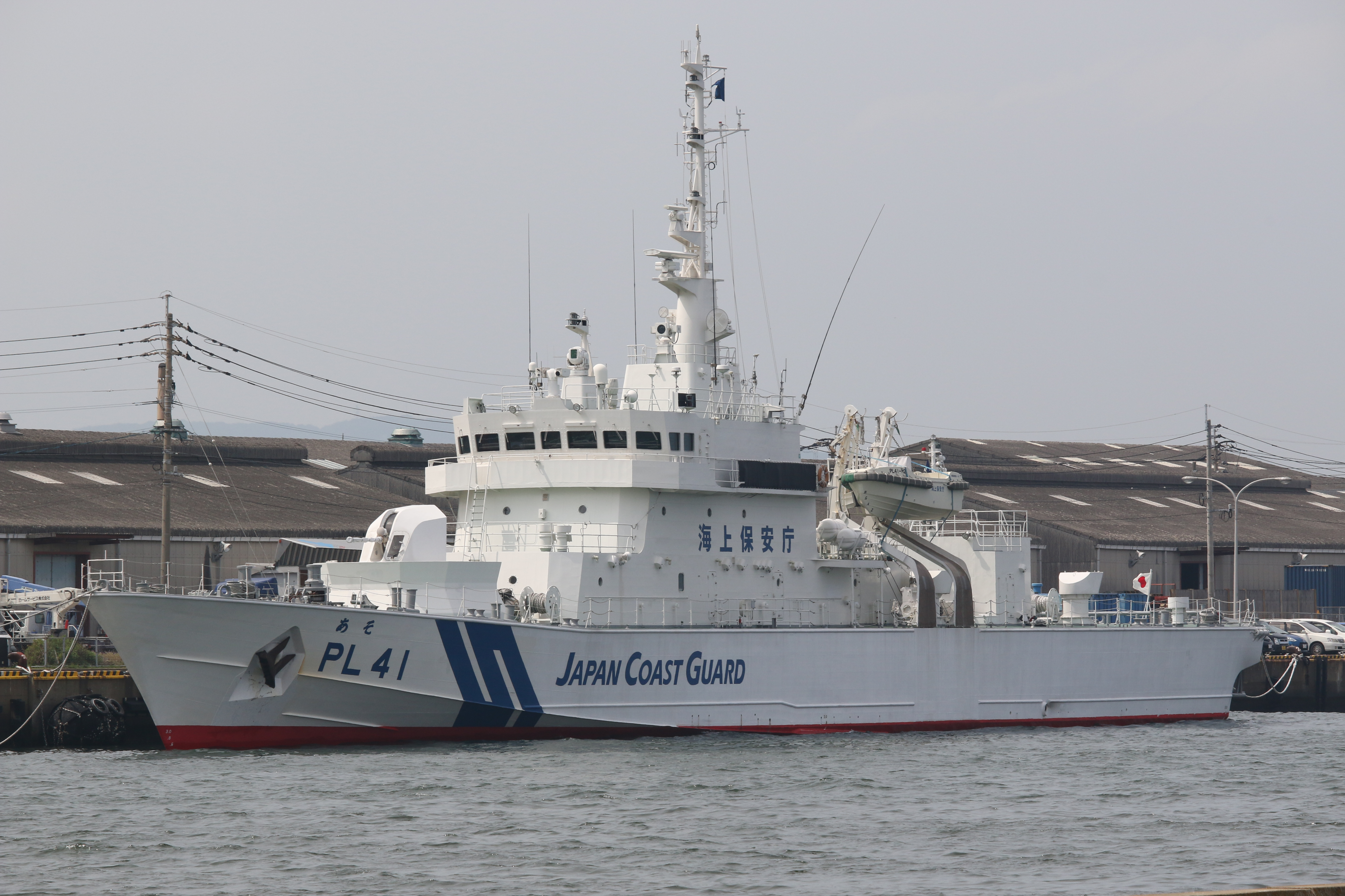 1番船のPL41 あそ。2・3番船では船橋構造や後部吸気室の形状が変更されている。